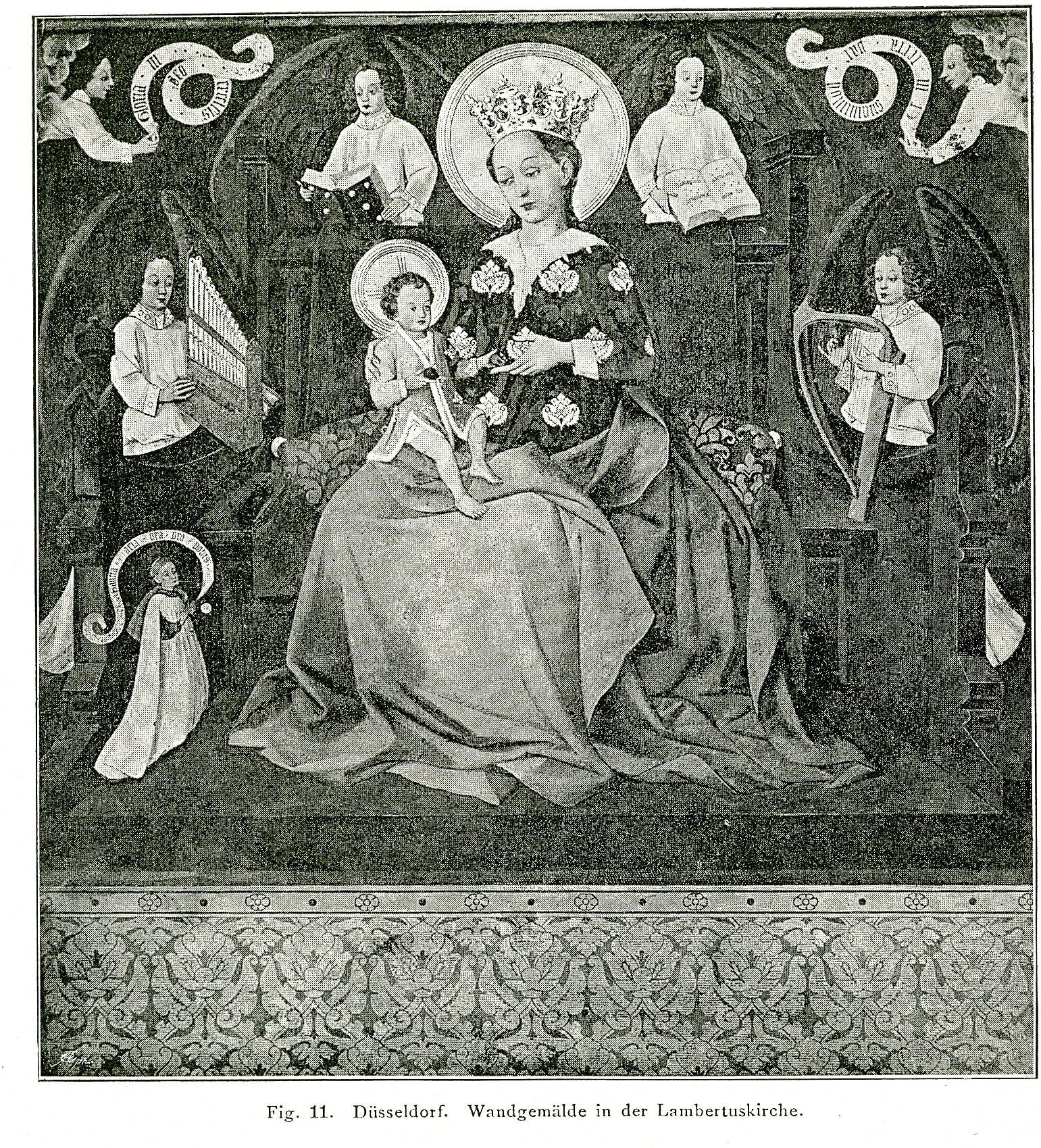 St. Lambertus, Düsseldorf-Altstadt, Wandgemälde des 15. Jh., restauriert durch Heinrich Lauenstein